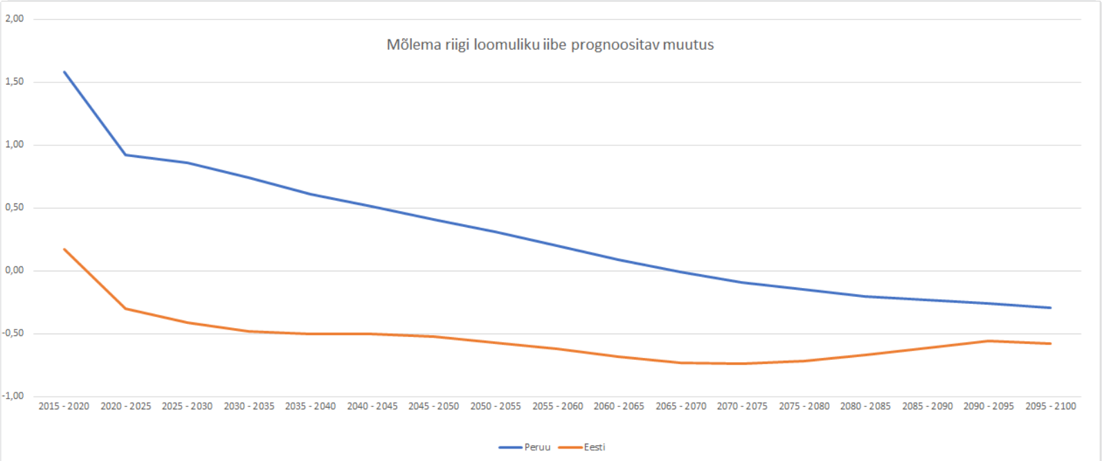 Peruu iibe ennustatav muutus